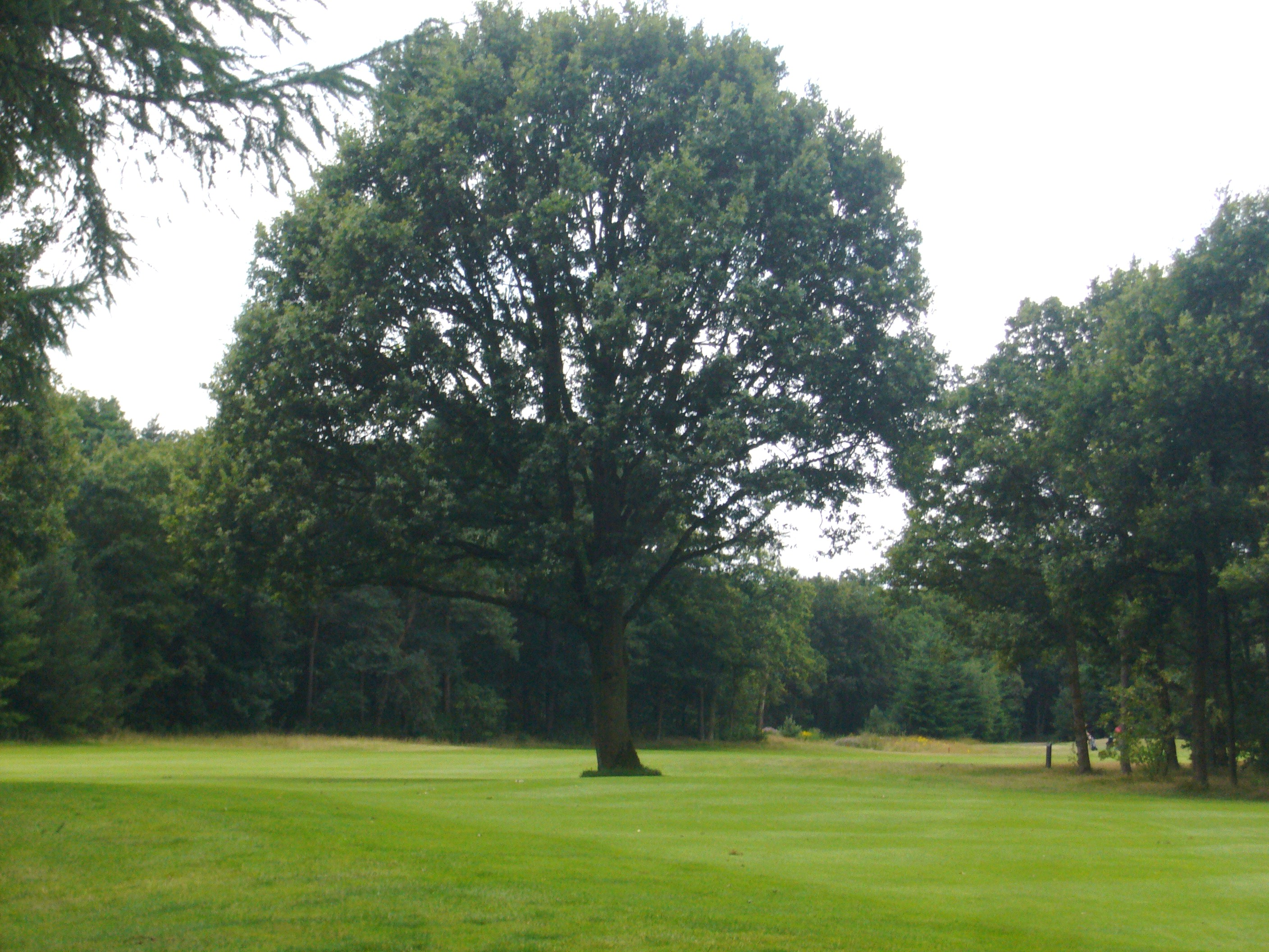 Oosterhoutse Golf Club, hole met boom op fairway